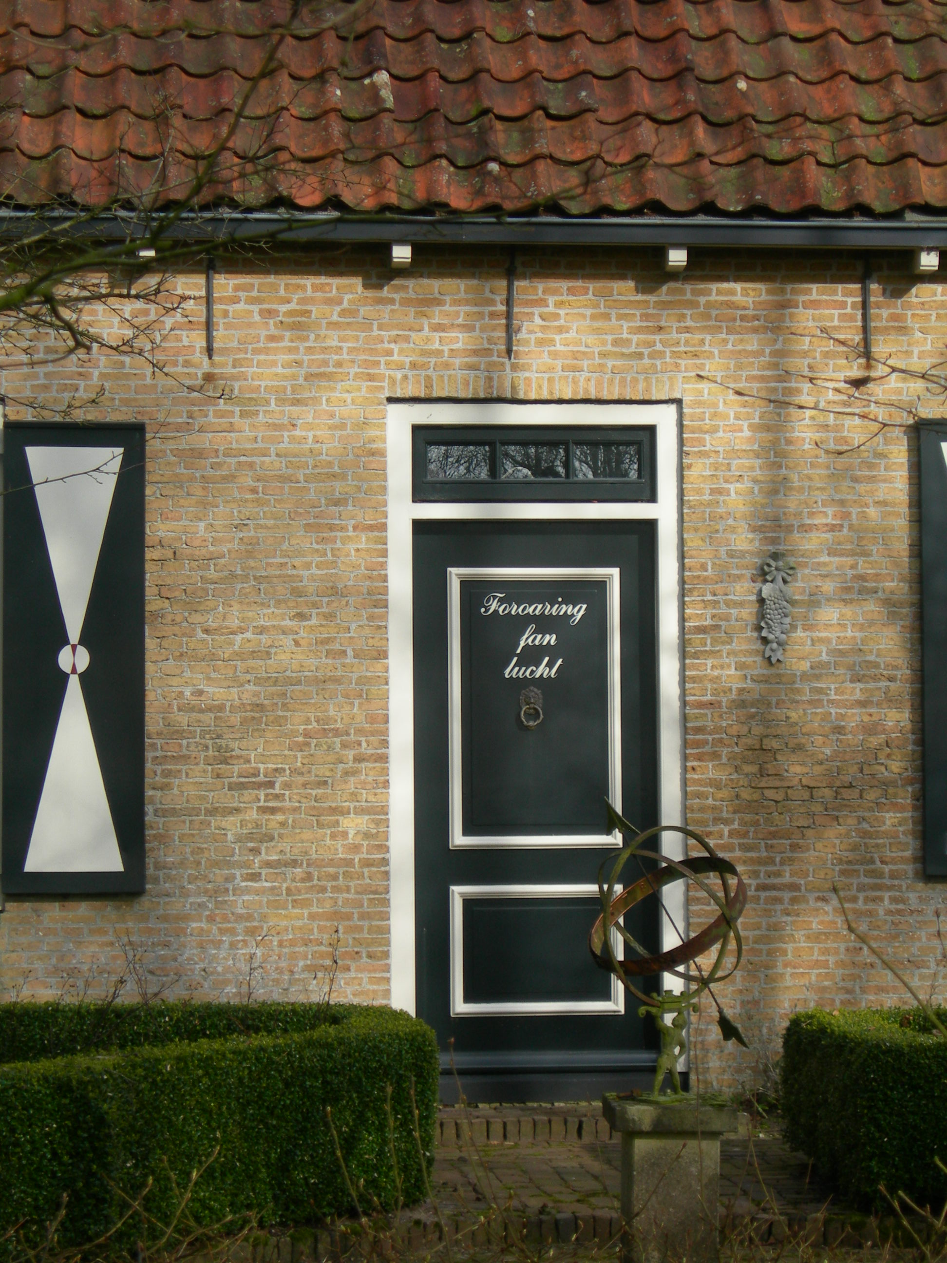 Voordeur nr.3 Beetsterzwaag